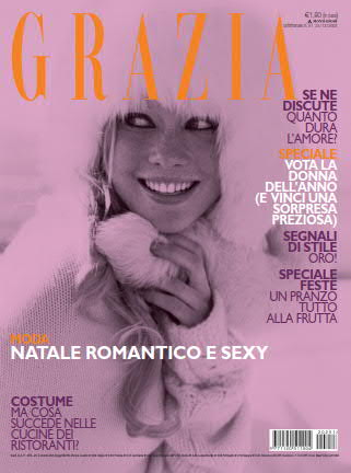 Copertina della rivista Grazia 24 dicembre 2002, Arnoldo Mondadori Editore.